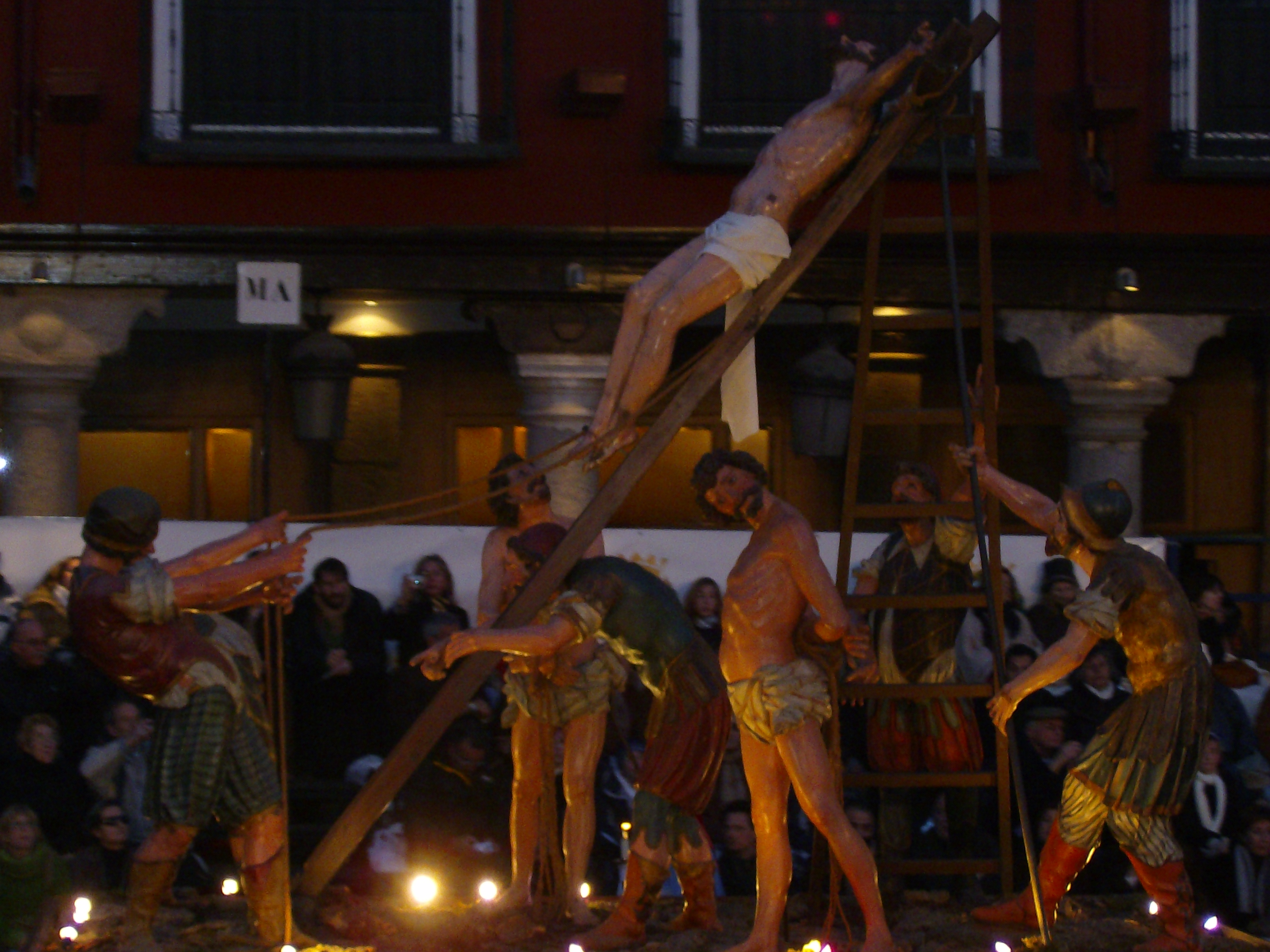 Exaltación de la Cruz (Francisco del Rincón), Valladolid